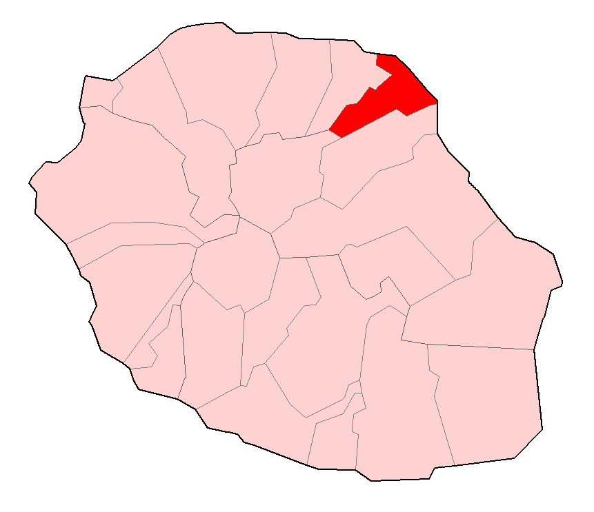 Carte de la Réunion permettant de localiser Saint-André.